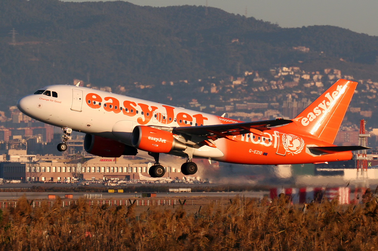 Barcelona El Prat (LEBL/BCN) Airport